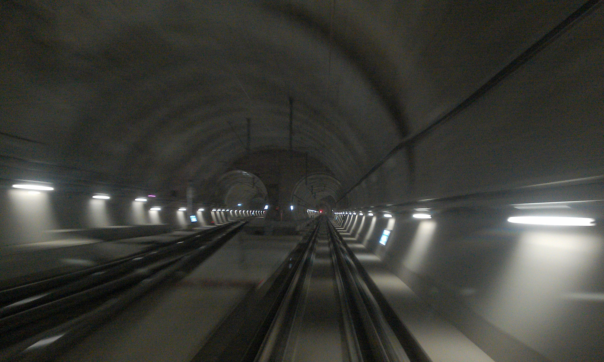 한국철도공사 영동선 솔안신호장